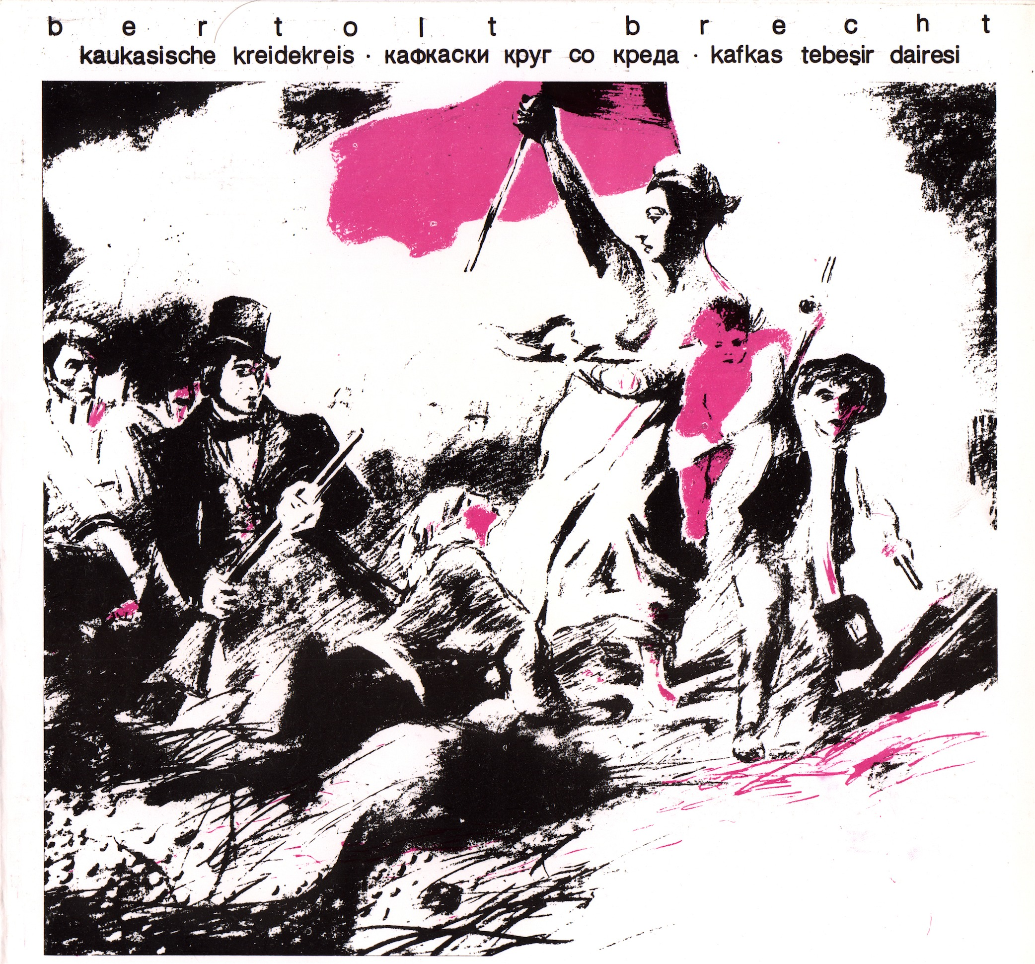 Yücel Erten Arşivinden